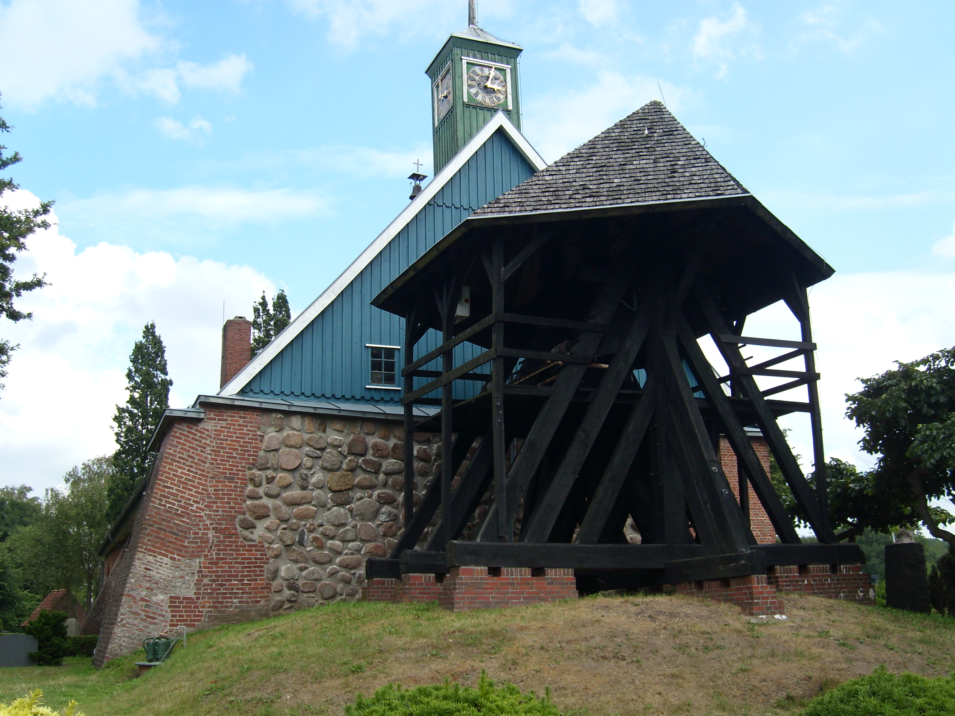 Die St.-Marien-Kirche zu Heiligenstedten am rechten Störufer mit Glockenstuhl